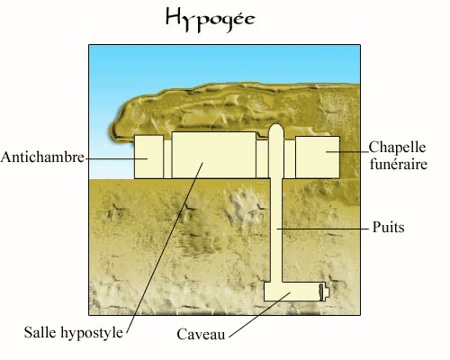 Schéma d'un hypogée Source : Ekipage Statut : GFDL Ekipage